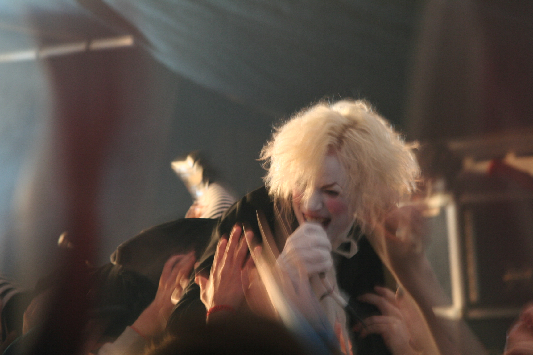 Animal Alpha